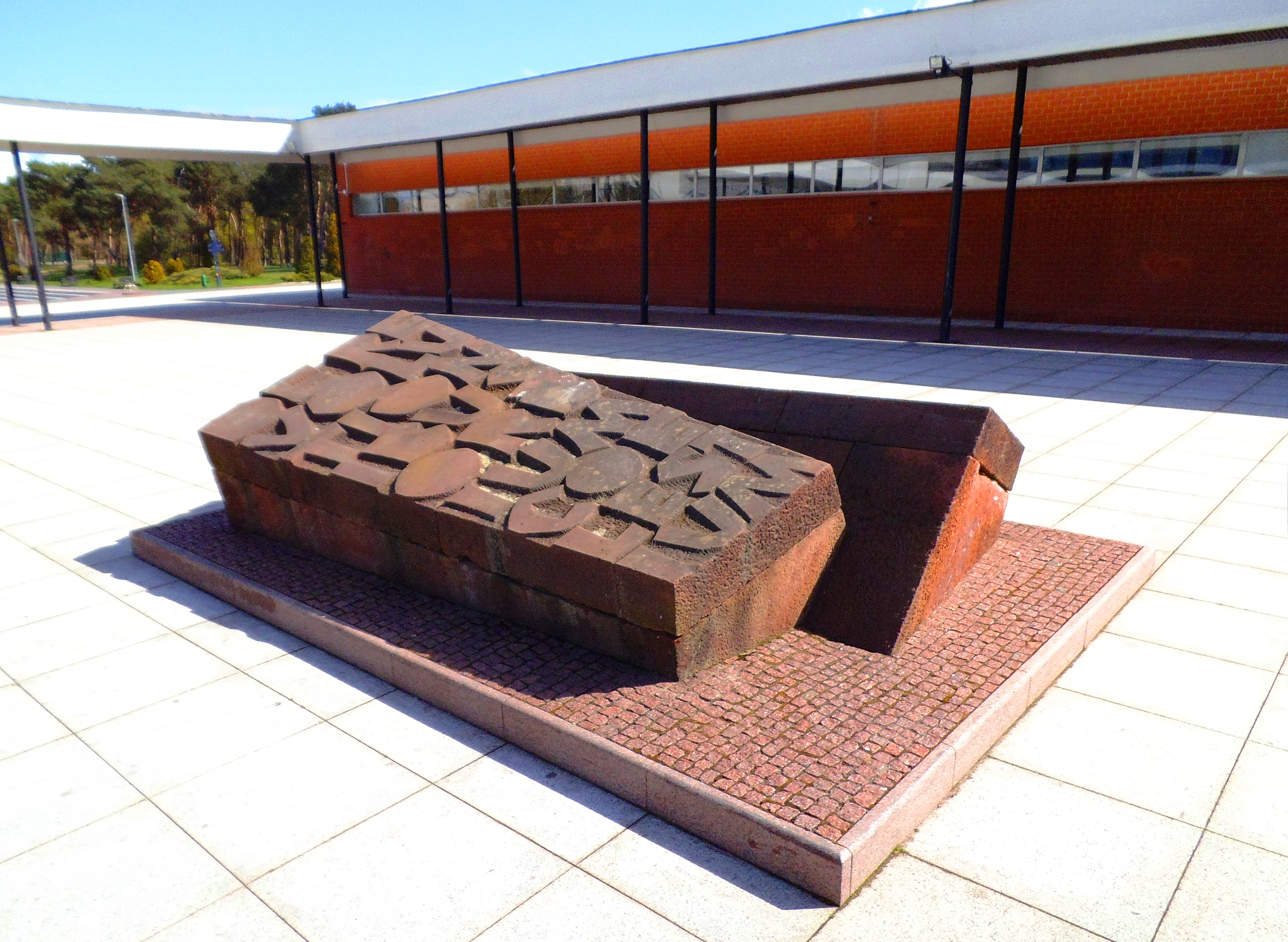 Instalacja artystyczne - De revolutionibus w Toruniu